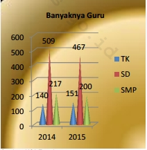 Jumlah Guru di Kecamatan Trucuk Tahun 2014 & 2015